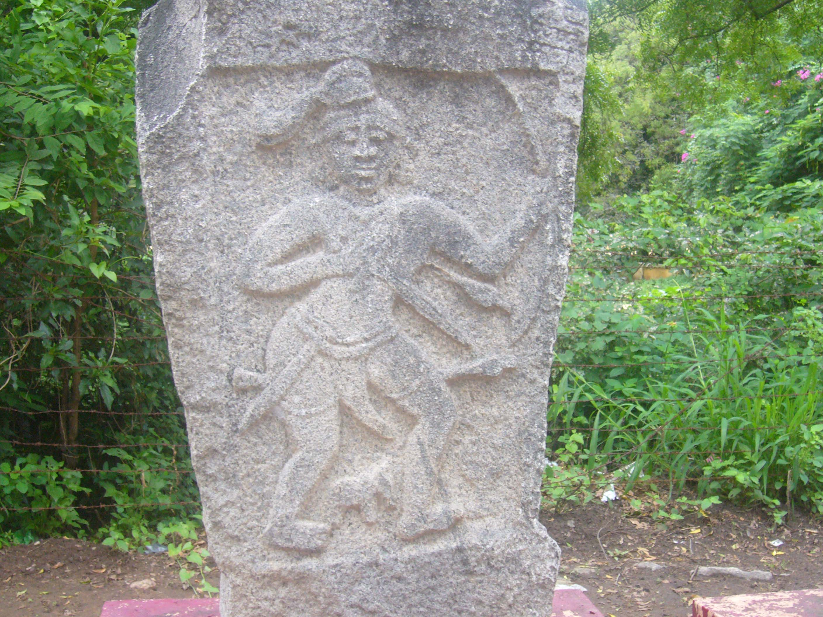 Nadukal in vellore